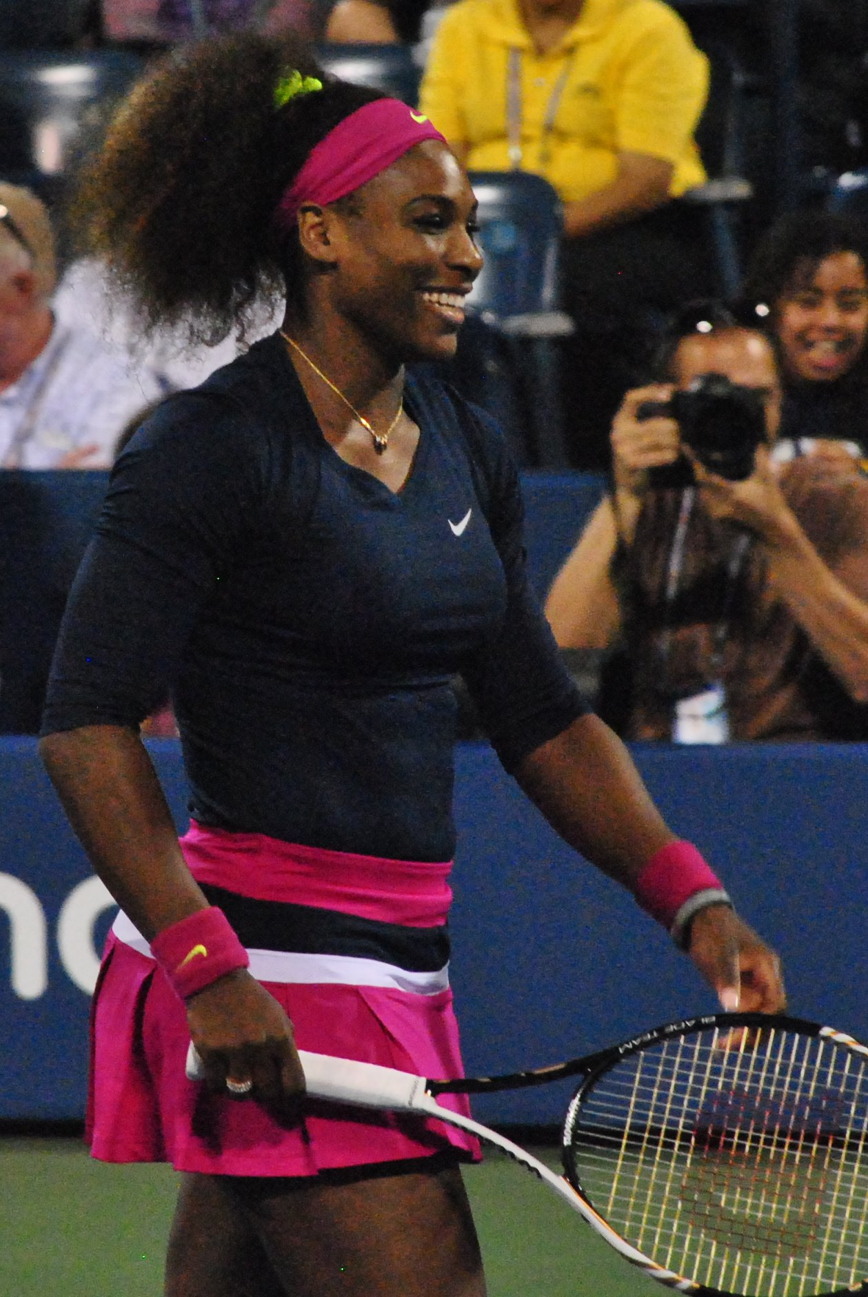 US Open